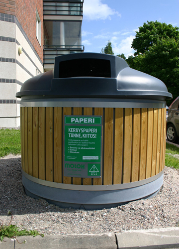 Paperinkeräysastia